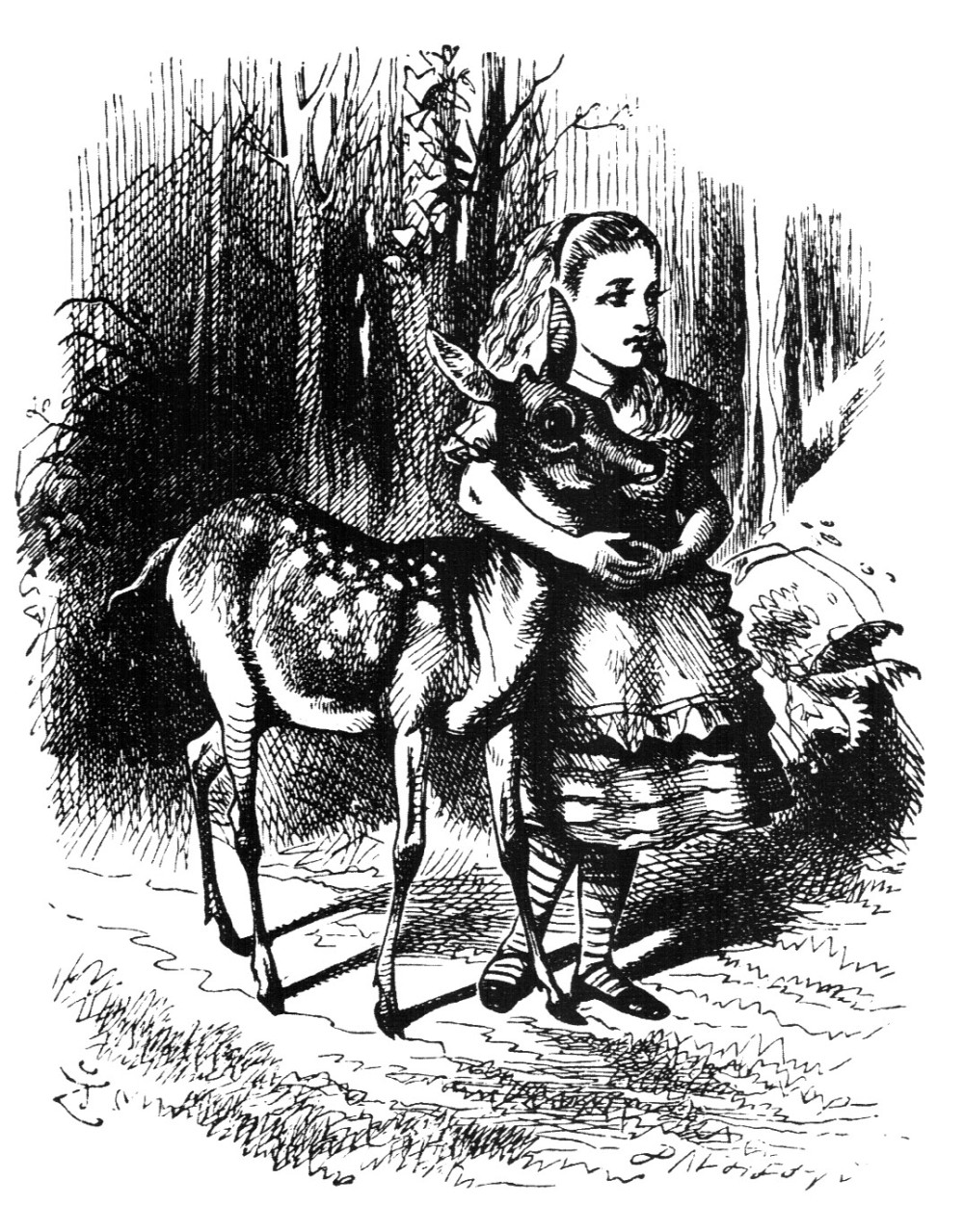 гравюра Джона Тенниела